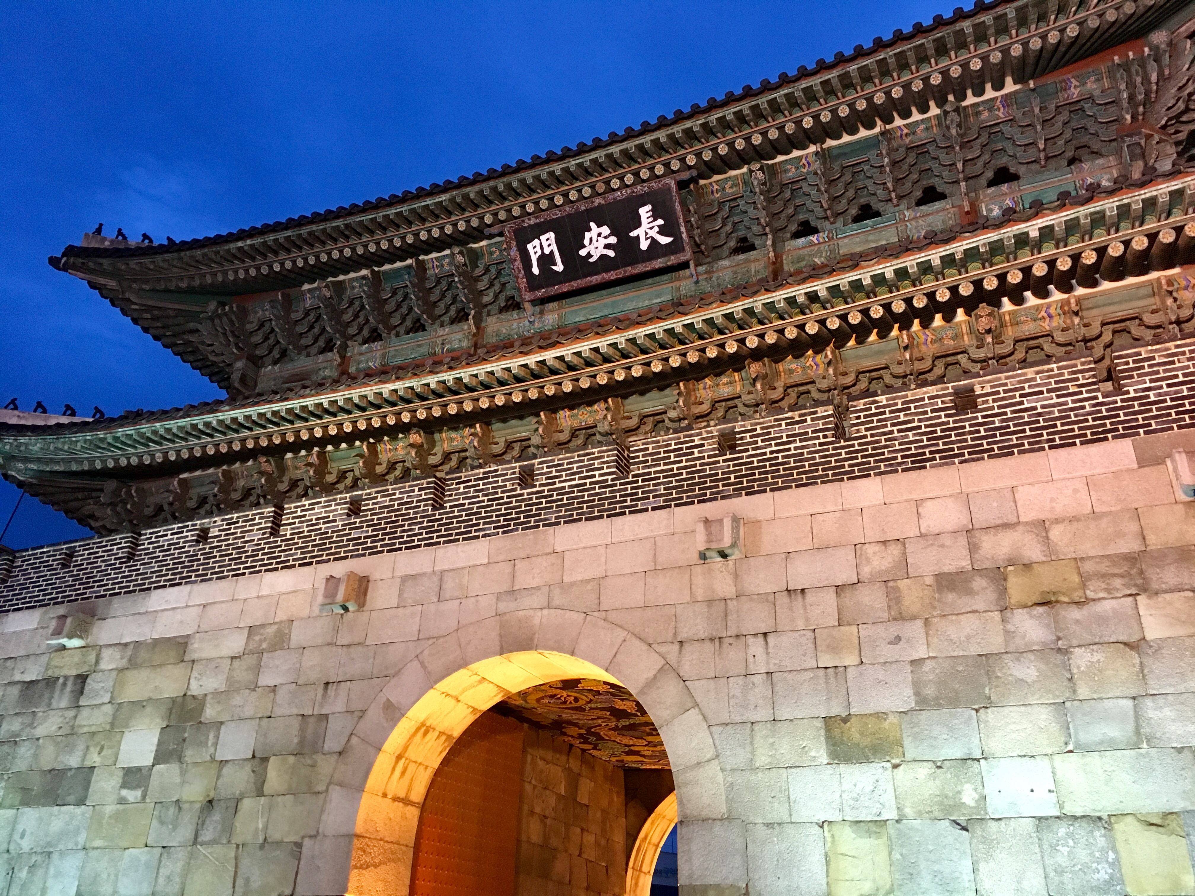 장안문의 앞모습입니다.(옹성 안에서 찍음)